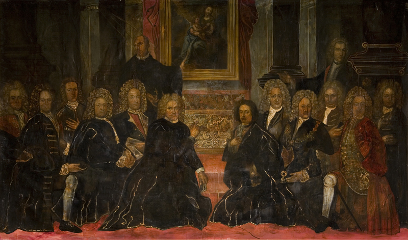 Schilderij van de Proostbroeders van Sincte Moor uit het begin van de 18e eeuw - hangt in de Kapel van Onze-Lieve-Vrouw-ten-Steen